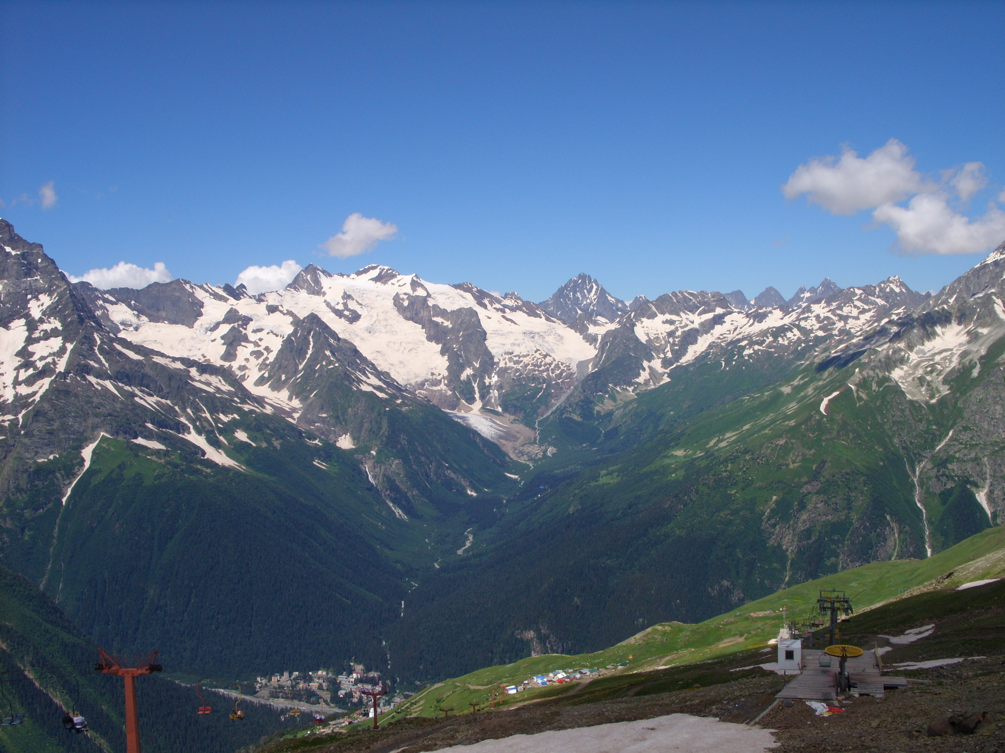 Экскурсия в Домбай из Железноводска, июль 2009 г.